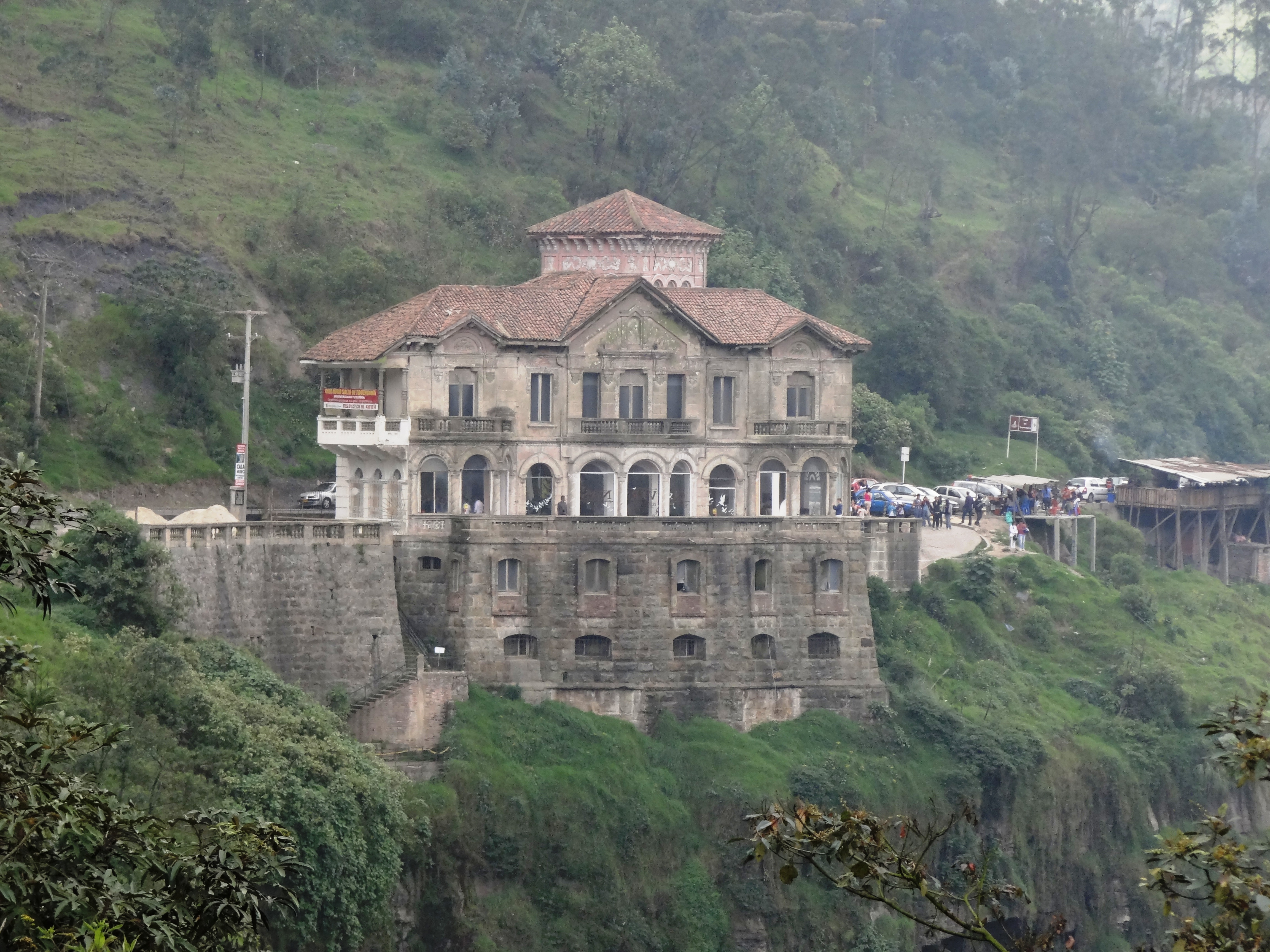 Museo sobre la vía aledaña al Salto del Tequendama, Cundinamarca, Colombia.